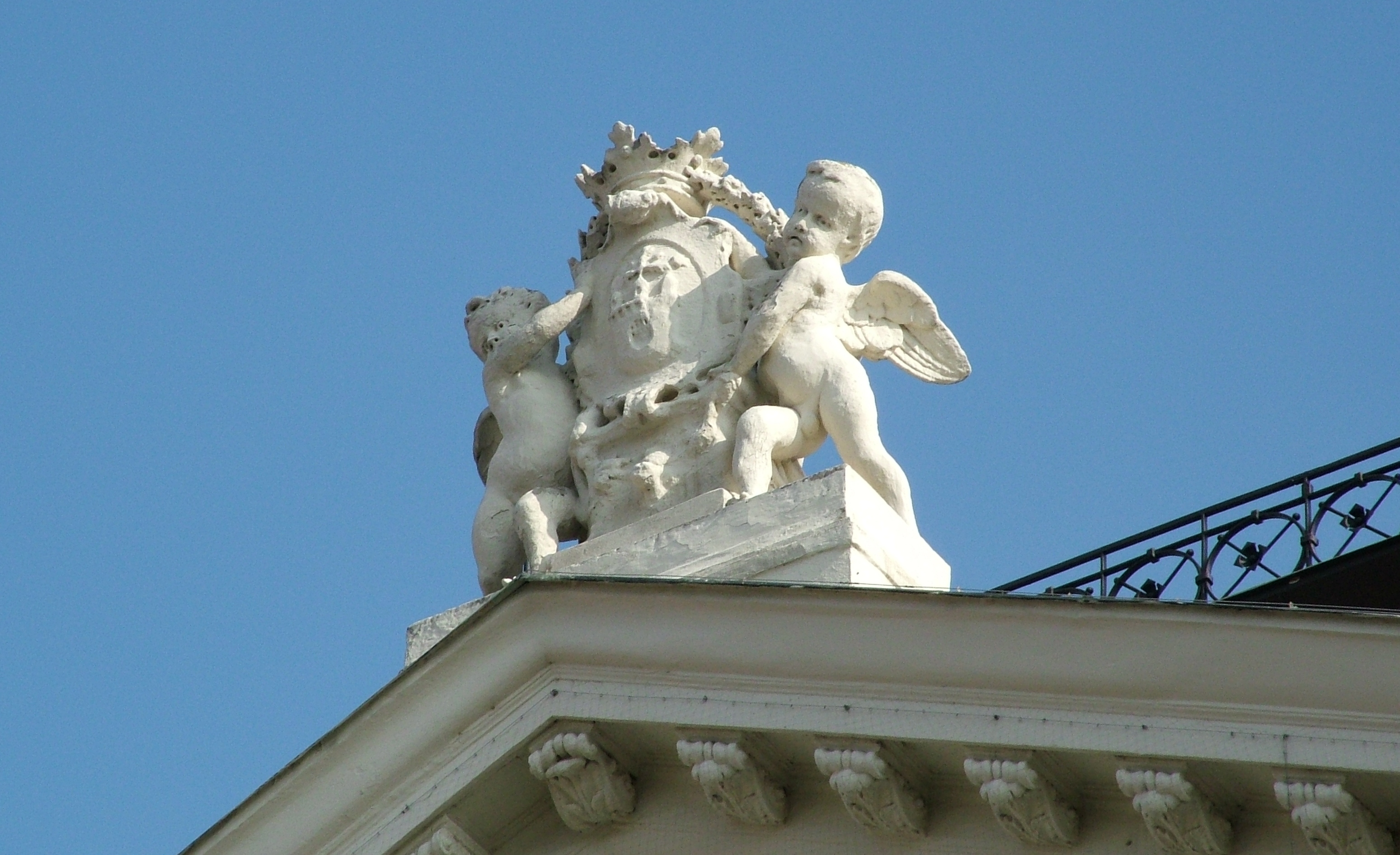 Veszprémi megyeháza: homlokzati oromdísz